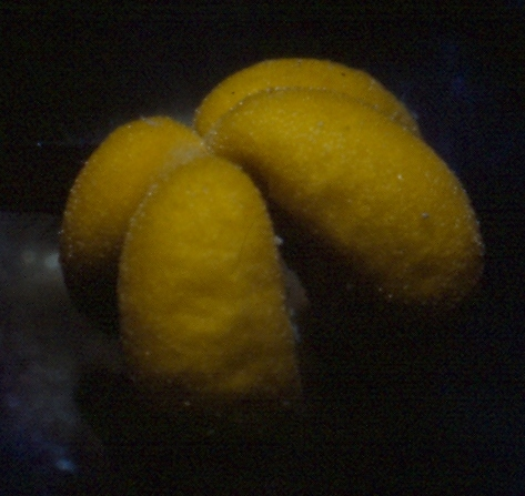 Blütenpollen des Usambara-Veilchens. Fotografiert von User:Ile-de-re ca. 1980; digitalisiert am 10.12.2006